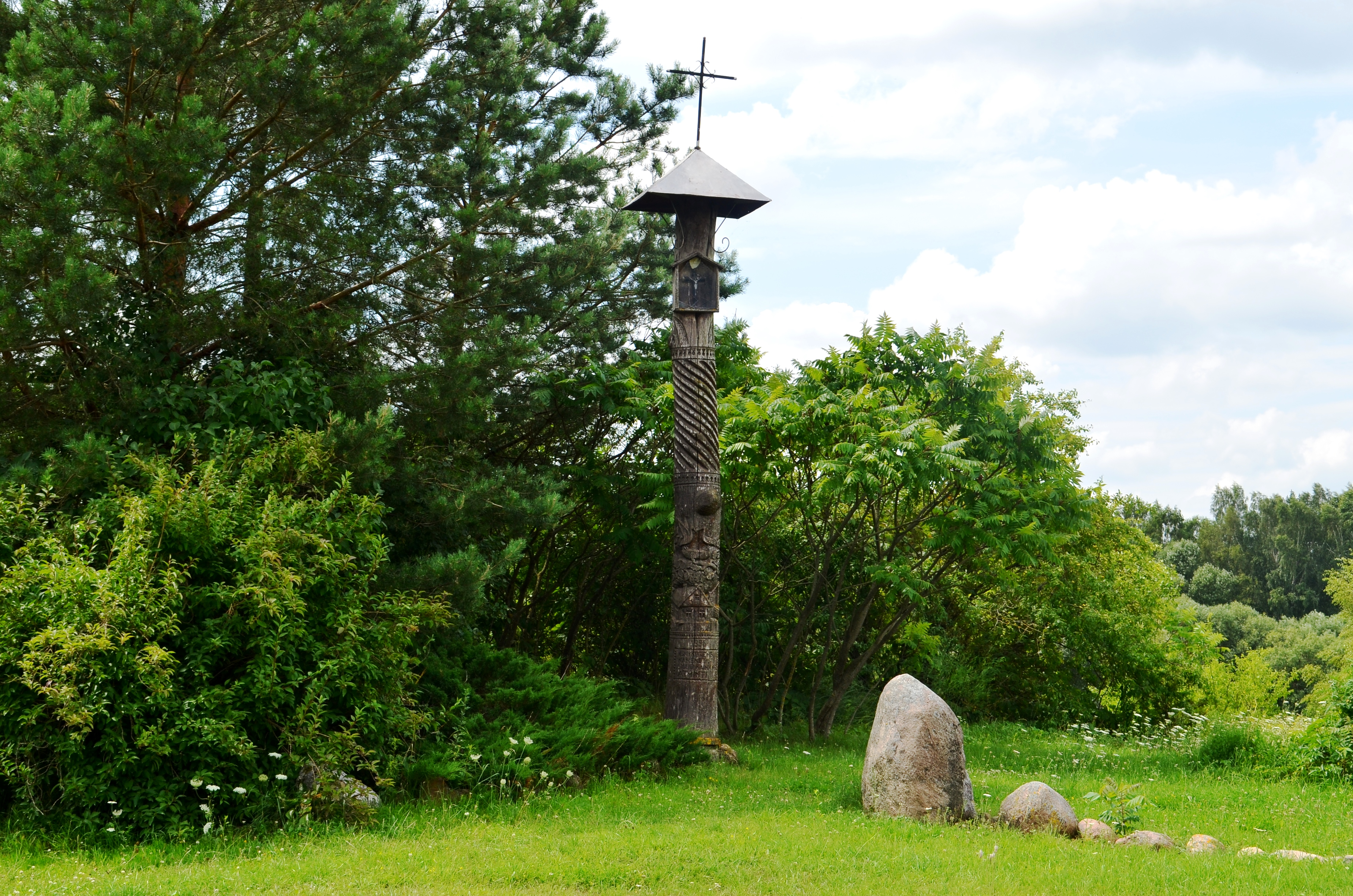 Stogastulpis kaimų atminimui, Liolių k., Šėtos sen., Kėdainių raj.